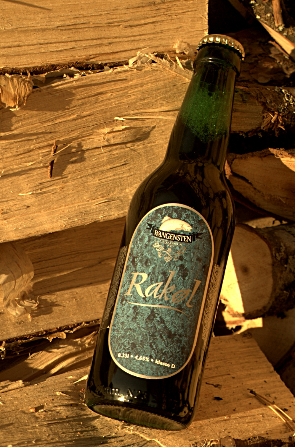 Wangensten